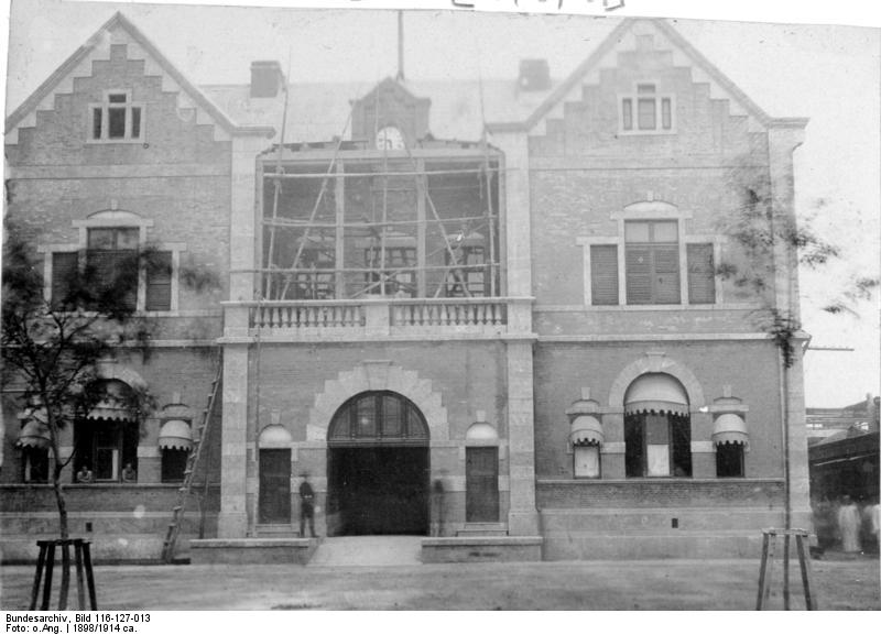 China, Tientsin Französisches Klubgebäude in Tientsin